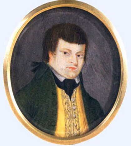 Каменев Гавриил Петрович